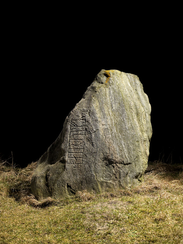 Foto: Nationalmuseet ved Roberto Fortuna